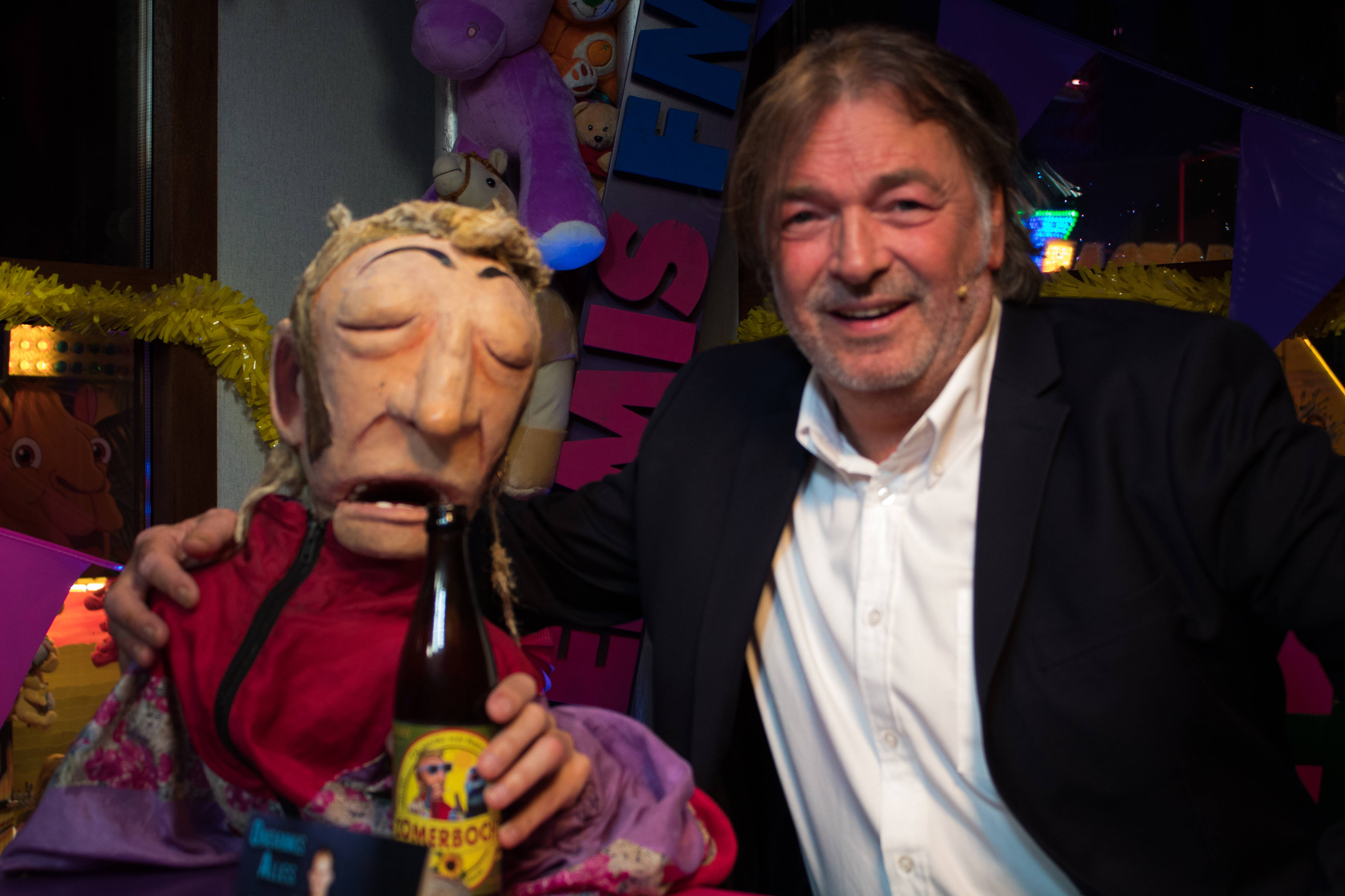 Presentator Ron Schuurkers en Ferry van der Zaande van het Programma Kermis Laat